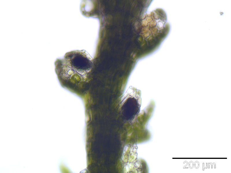 Kriechendes Schuppenzweig-Lebermoos (Lepidozia reptans), Flankenblätter mit Sporogonen, Rostock